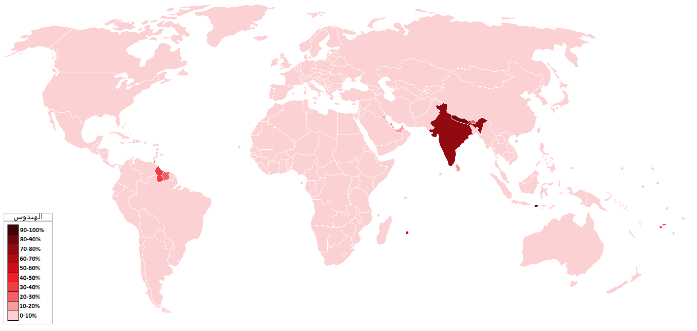 خارطة تُظهر انتشار الهندوس في العالم - هل تُعاني من مشاكل بالألوان؟ أضغط هنا[1].